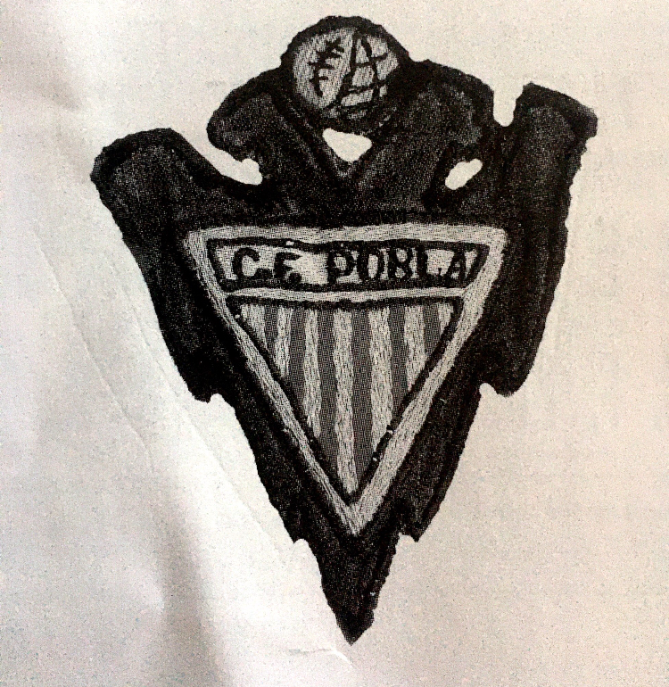 Escut del CF Pobla entre 1958 i 1985